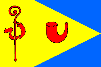 Drapeau de Heythuysen.